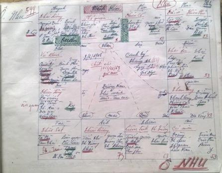 N Đ Nhu2